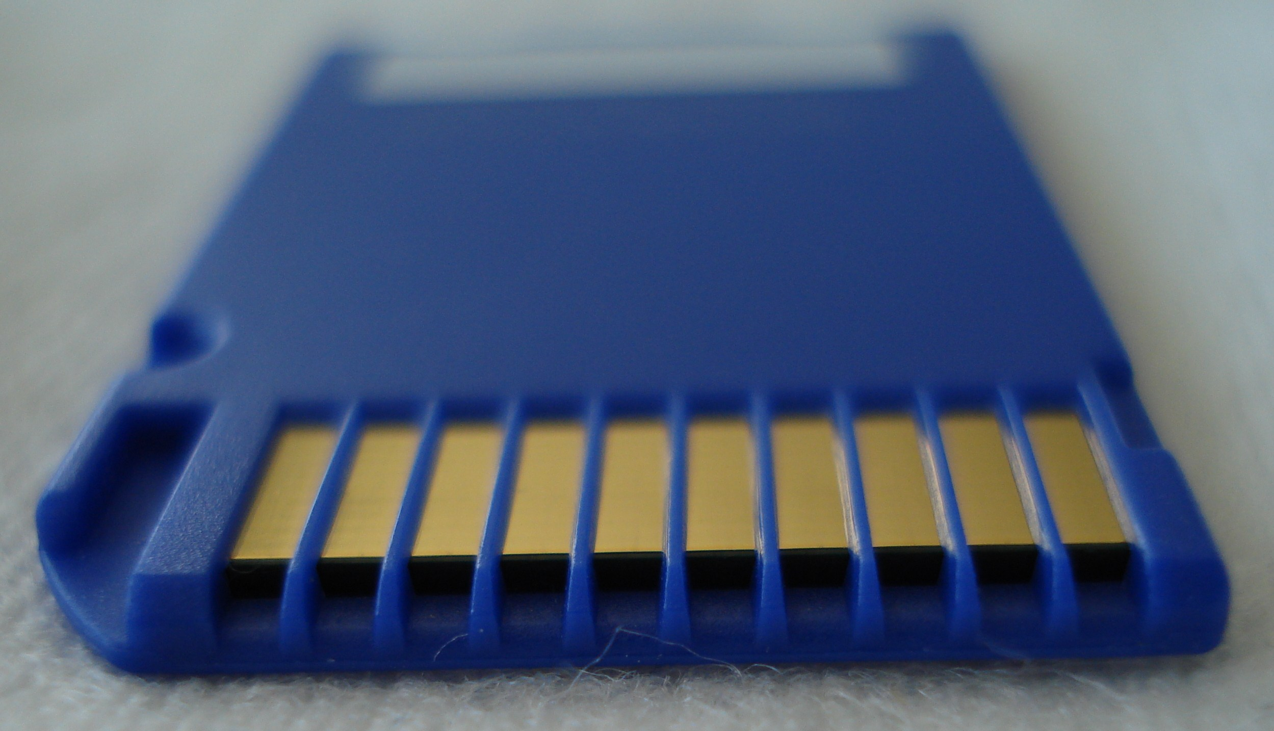 Bild på kontaktytan på Memory Stick Pro Duo